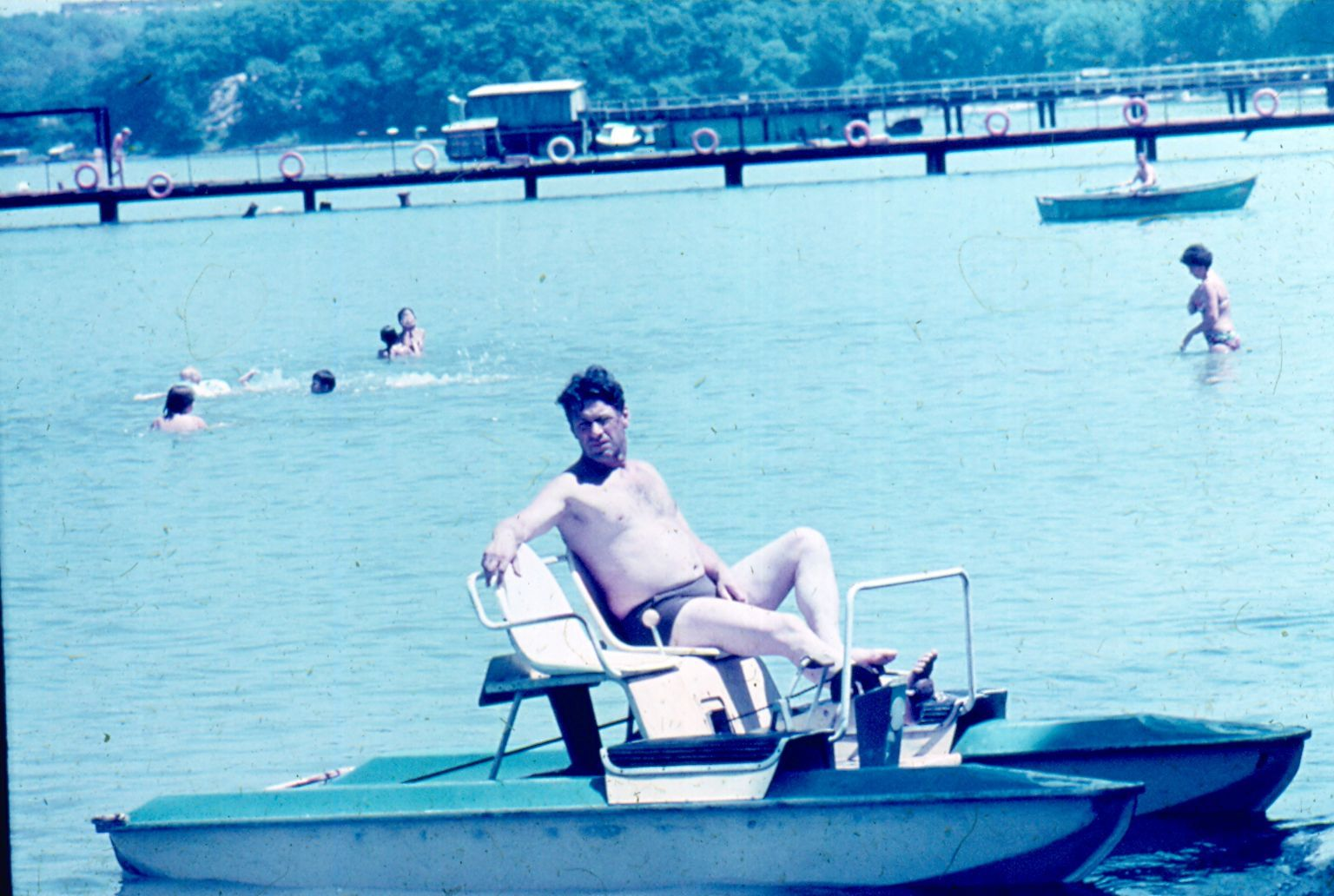 Водный велосипед. Владивосток, Садгород, 1982 год.